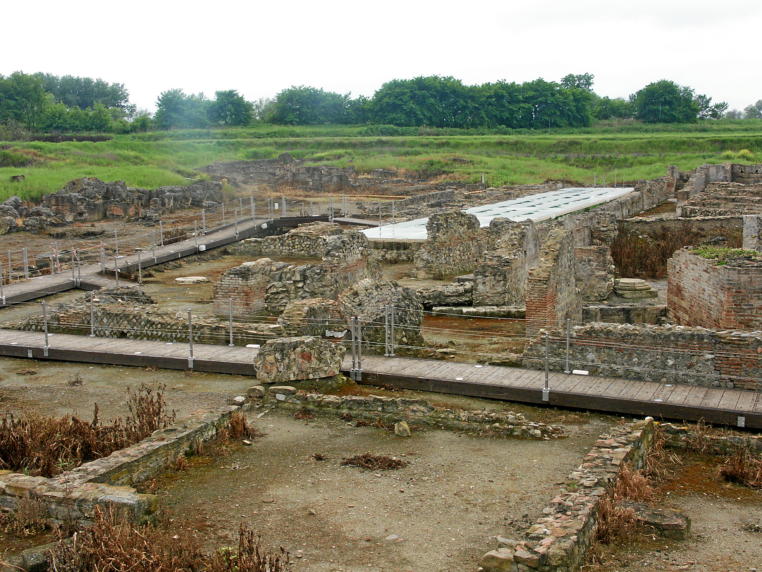 Sibari: Überblick über das archäolog. Gelände